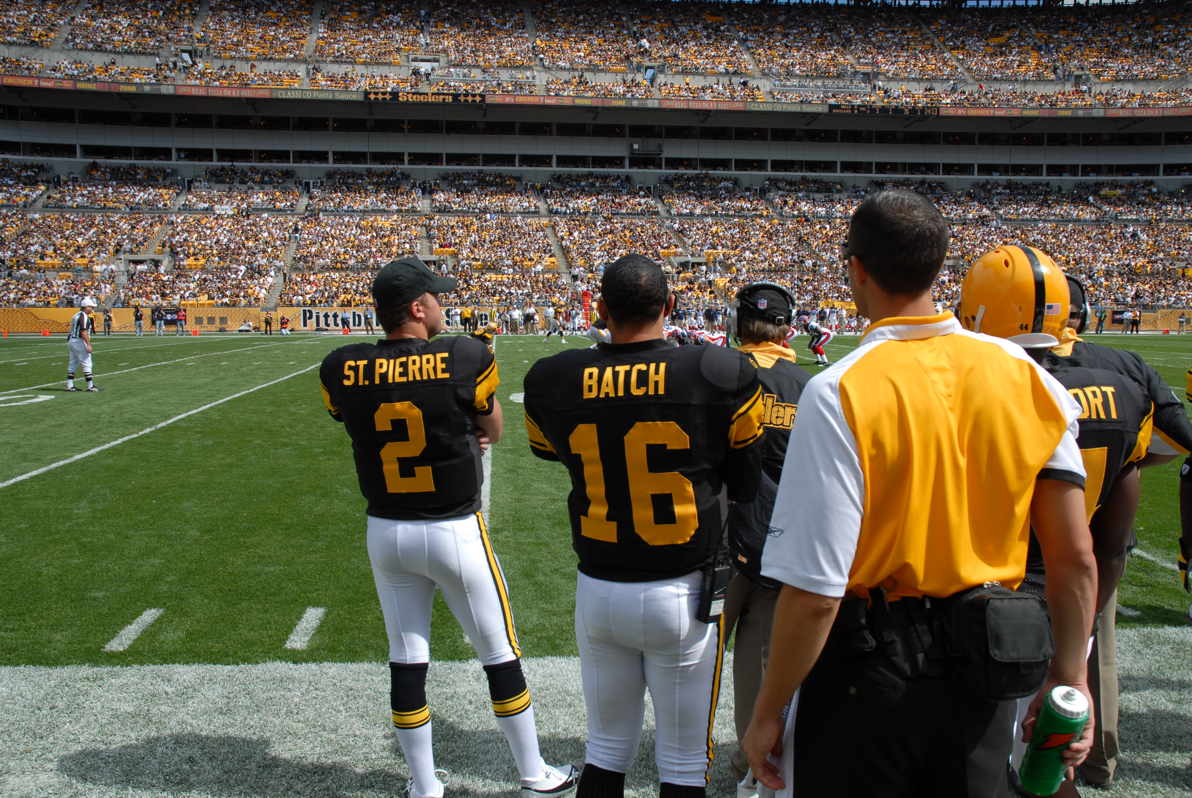 Brian St. Pierre (à gauche) et Charlie Batch (à droite), sur le bord du terrain, lors du match entre les Steelers de Pittsburgh et les Bills de Buffalo, le 16 septembre 2007